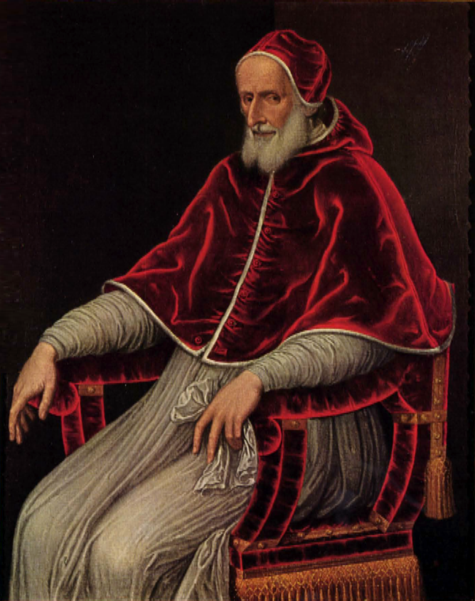 Ritratto di San Pio V opera di un anonimo pittore lombardo, conservato nel Collegio Ghislieri di Pavia